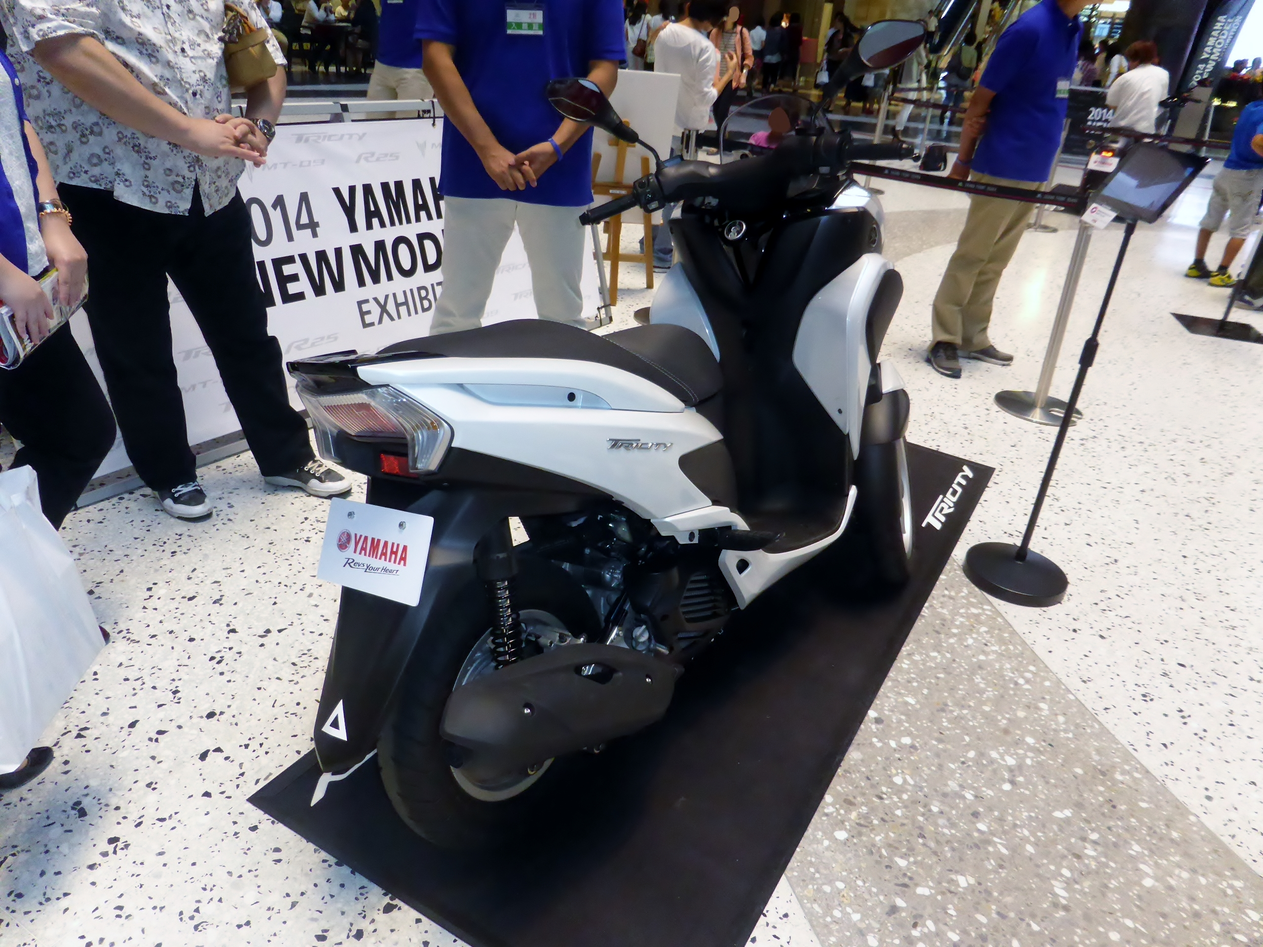 ヤマハ・トライシティを撮影。